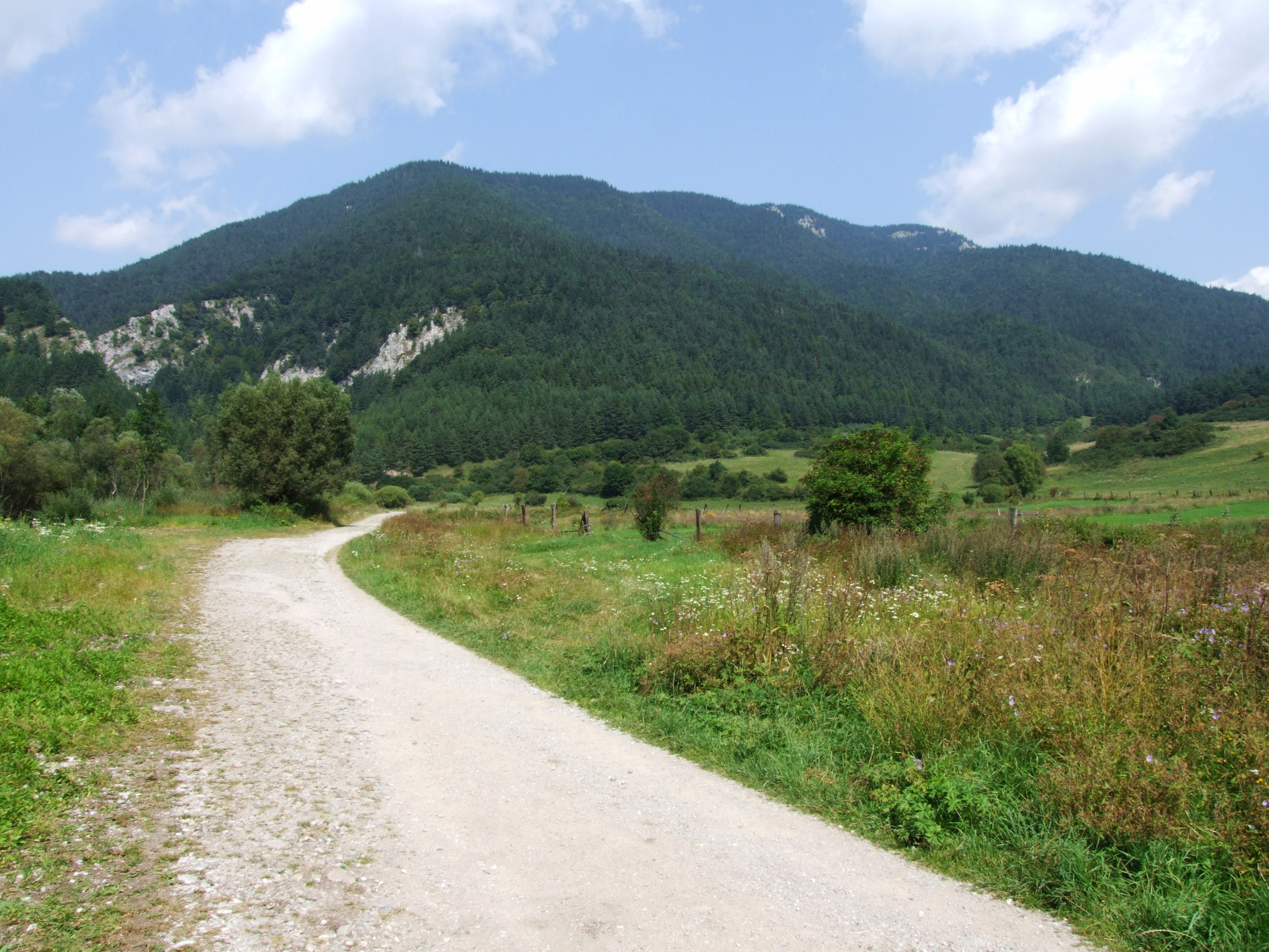 Prosečné (Prosieczne, Góry Choczańskie). Widok z parkingu przed wlotem do Doliny Prosieckiej